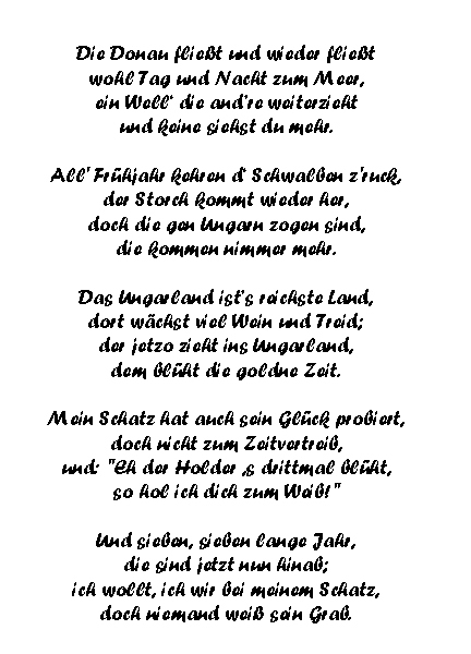 Das verlassene Mägdlein. Volkslied aus der Zeit der großen Ungarnzüge im 18. Jahrhundert Die Donau fließt und wieder fließt wohl Tag und nacht zum Meer, ein' Well' die andre weiterzieht und keine siehst du mehr. All' Frühjahr' kehren d'Schwalben [Schwälbelein] z'ruck, der Storch kommt wieder her, doch die gen Ungarn 'zogen sind. die kommen nimmermehr. Das Ungarland ist's reichste Land, dort wächst viel Wein und Treid; [so hat's in Günzburg man verkünd't / die Schiff' steh'n schon bereit. Dort geit' viel Vieh und Fisch und G'flug / und taglang ist die Weid'] der jetzo zieht ins Ungarland, dem blüht die gold'ne Zeit. Mein Schatz hat auch sein Glück probiert, doch nicht zum Zeitvertreib, und: "Eh der Holder 's drittmal blüht, so hol' ich dich zum Weib!" Und sieben, sieben lange Jahr' die sind jetzt nun hinab; ich wollt' ich wär bei meinem Schatz doch niemand weiß sein Grab Literatur: Deutsche Gaue Bd. IX (1908), p. 31. Daniel Häberle, Auswanderung und koloniegründungen der Pfälzer im 18. jahrhundert, 1909, p. 162. Franz Eichert, Der Gral, Volume 20, Issues 1-6, Fredebeul & Koenen, 1925, p. 384. Karl Strölin, Die Schwaben im Ausland, Württemberg, 1935, p. 51. Katalin Árkossy, Maria Mirk, Sprache und Gesellschaft eines ungarndeutsches Bergmanndorfes im Spiegel seines Liedergutes: Sprachgebrauch in Pilisszentiván/Sanktiwan bei Ofen, 1997, p. 8. Melodie: Arbeitskreis für Landeskunde/Landesgeschichte RP Tübingen (schule-bw.de)